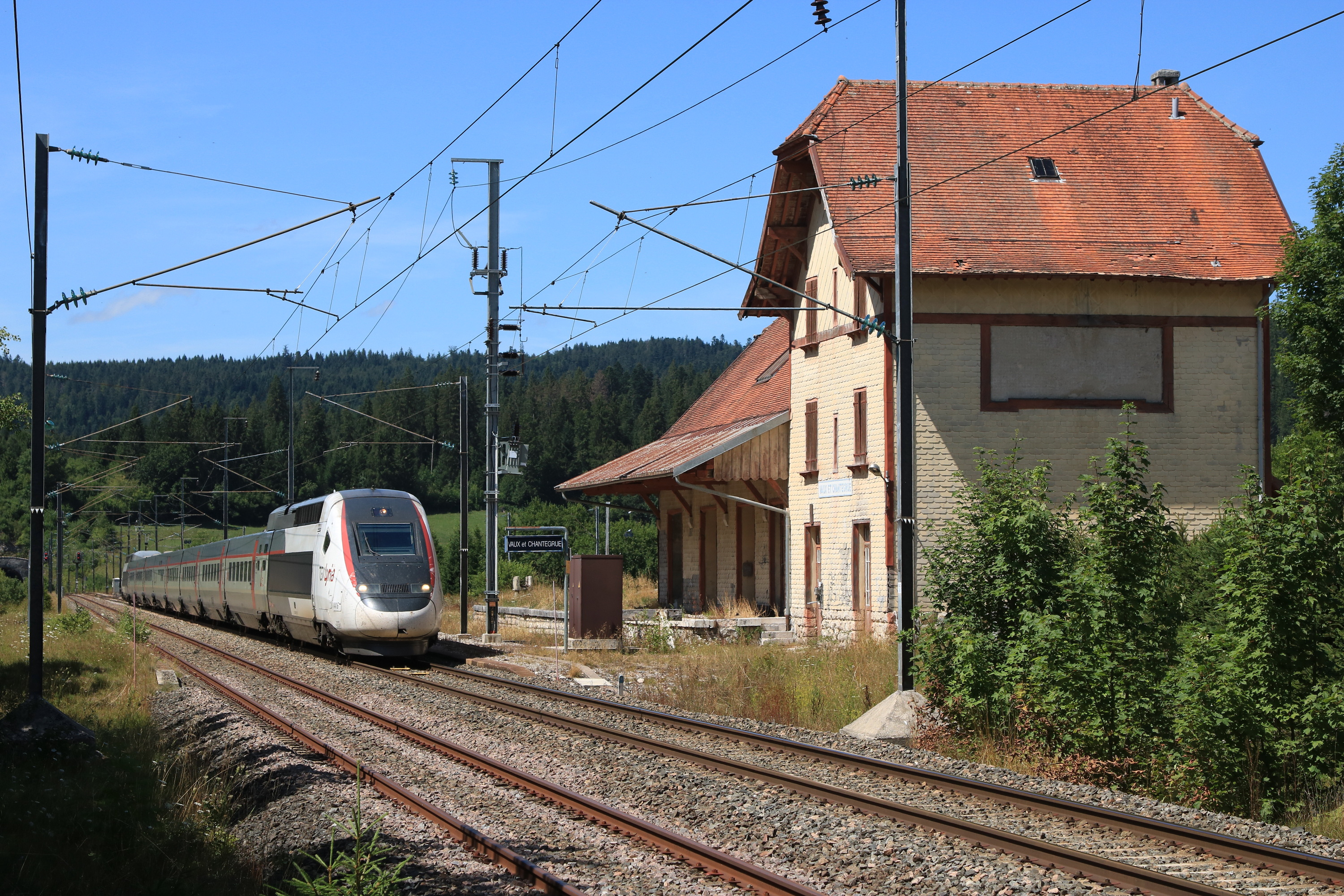 Le TGV n° 9269 (Paris - Lausanne) franchit sans arrêt la gare fermée de Vaux-et-Chantegrue, assuré par la rame TGV POS n°4416 en livrée Carmillon-Lyria.